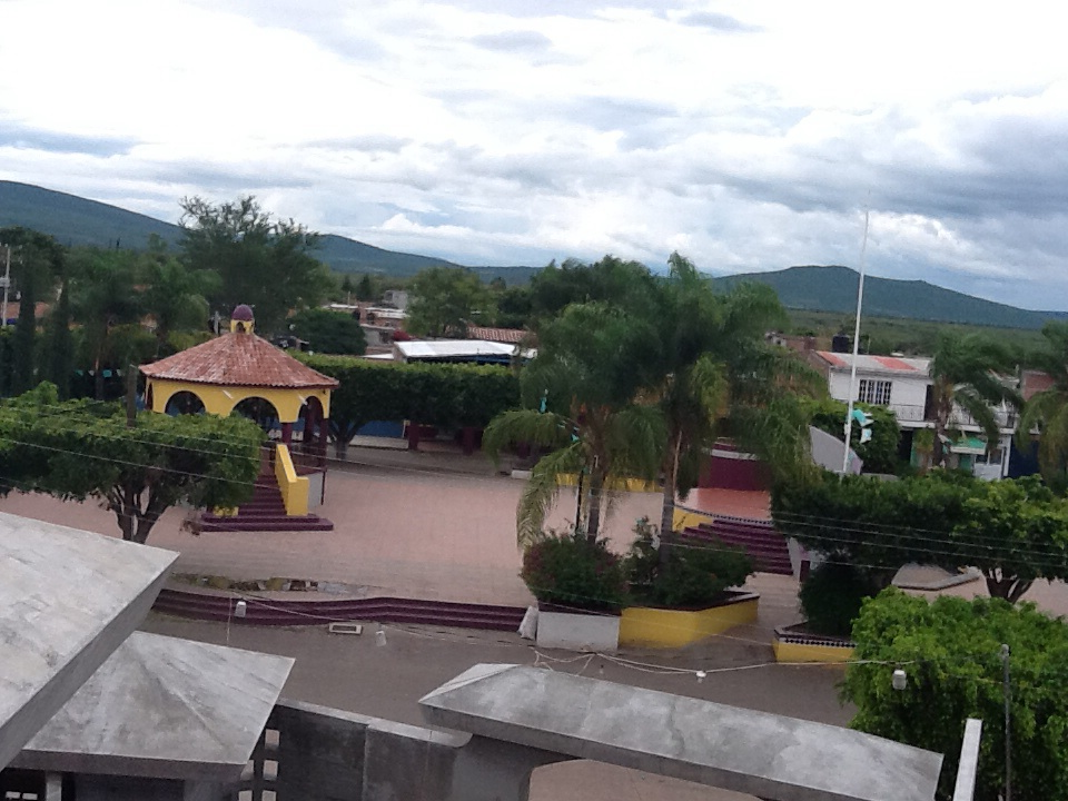 Plaza de El Colesio